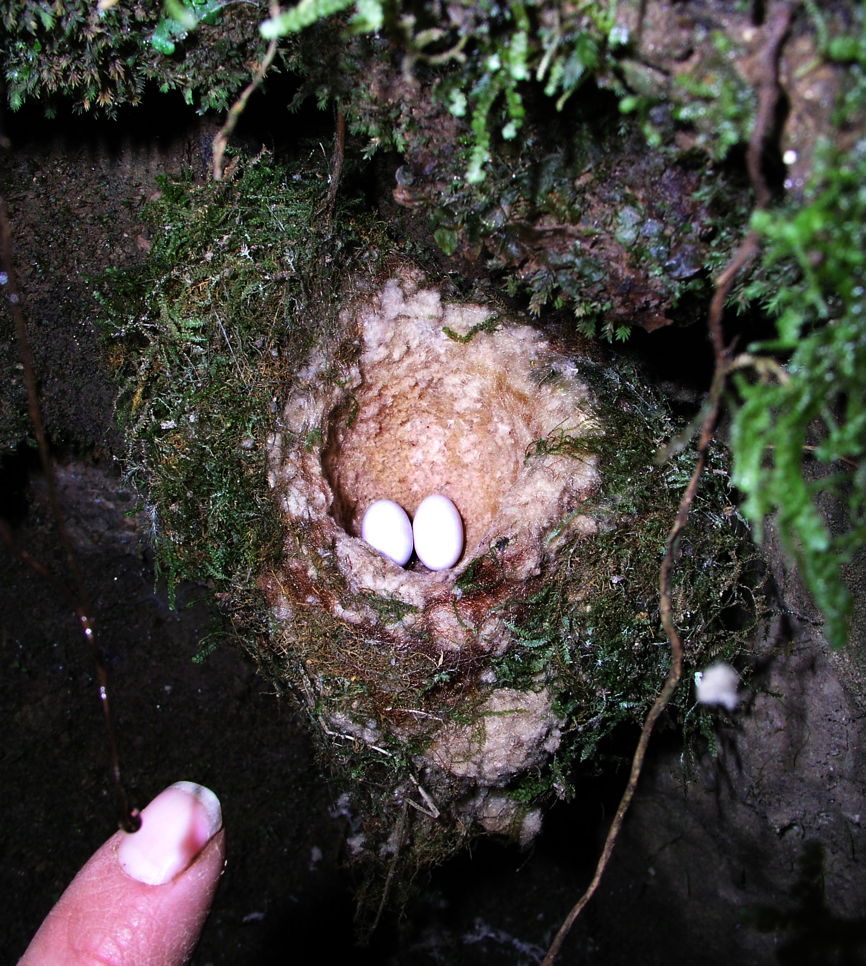 Nido de picaflor en el tragadero de Parjugsha Alto (Soloco, Chachapoyas, Amazonas, Peru)